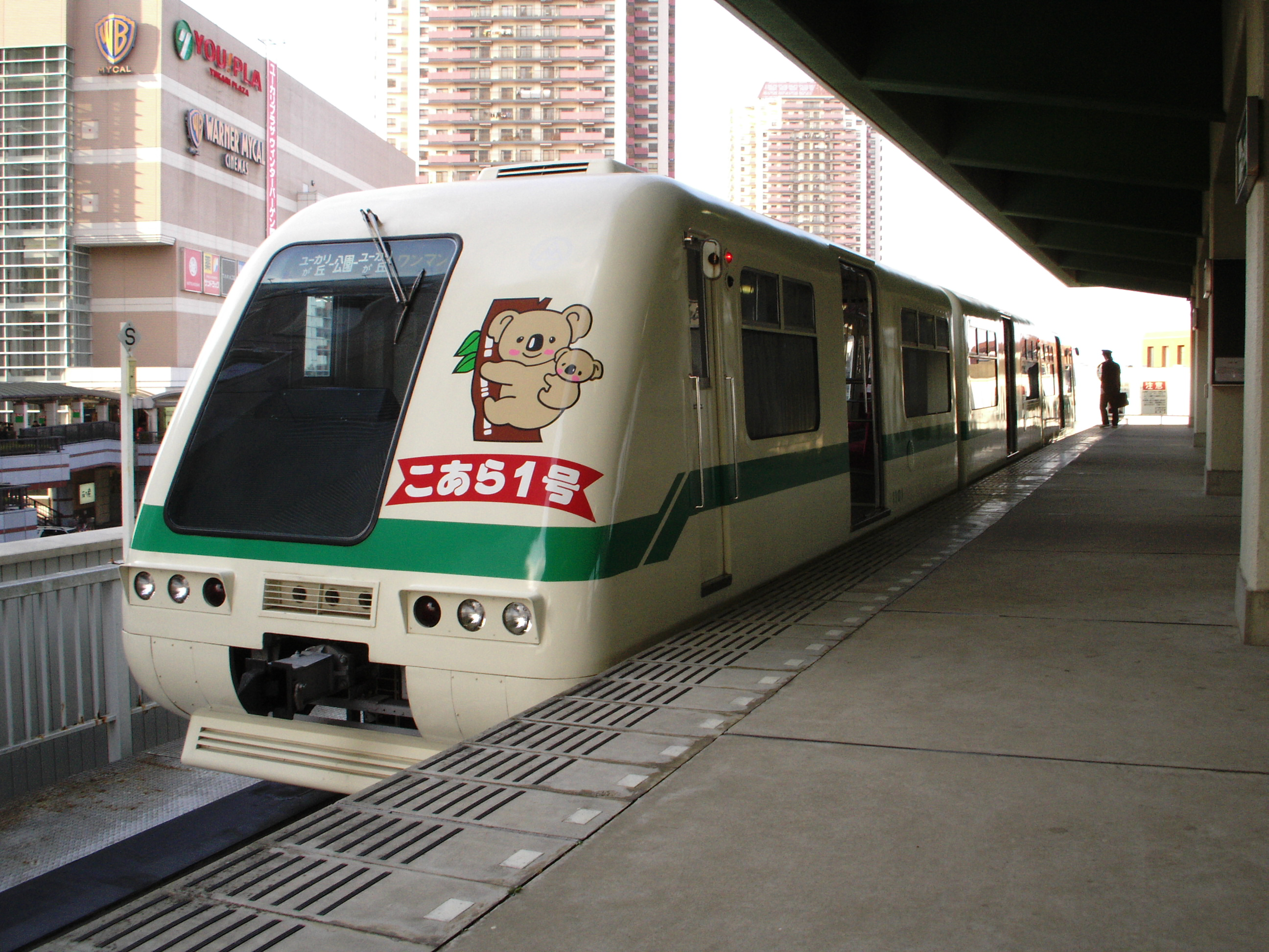 2007年01月19日投稿者撮影ユーカリが丘駅で